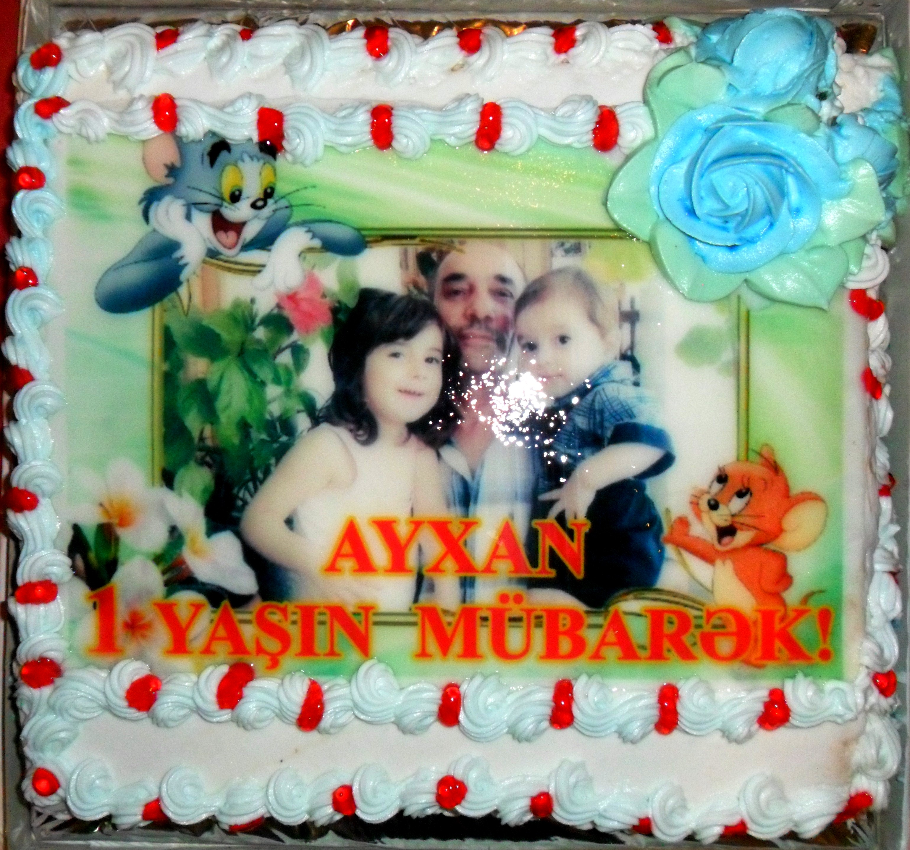 Əlhəddin Ceklinin nəvəsi Ayxanın 1 yaşı üçün tort